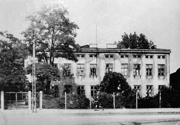 Biuro Oddziału w Łodzi na ulicy Rzgowskiej 24 (zdjęcie z lat powojennych)